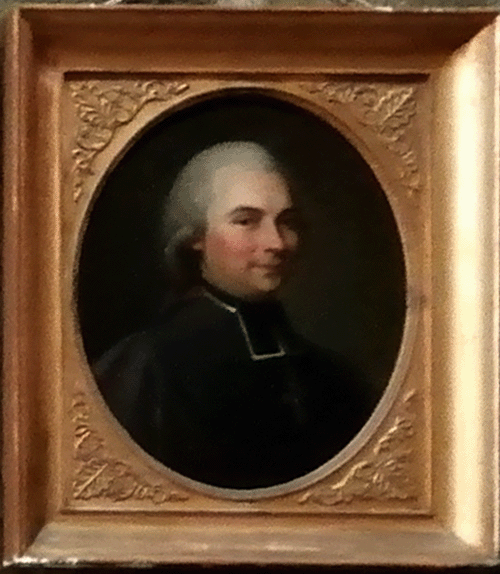 Poltred en iliz-veur Landreger